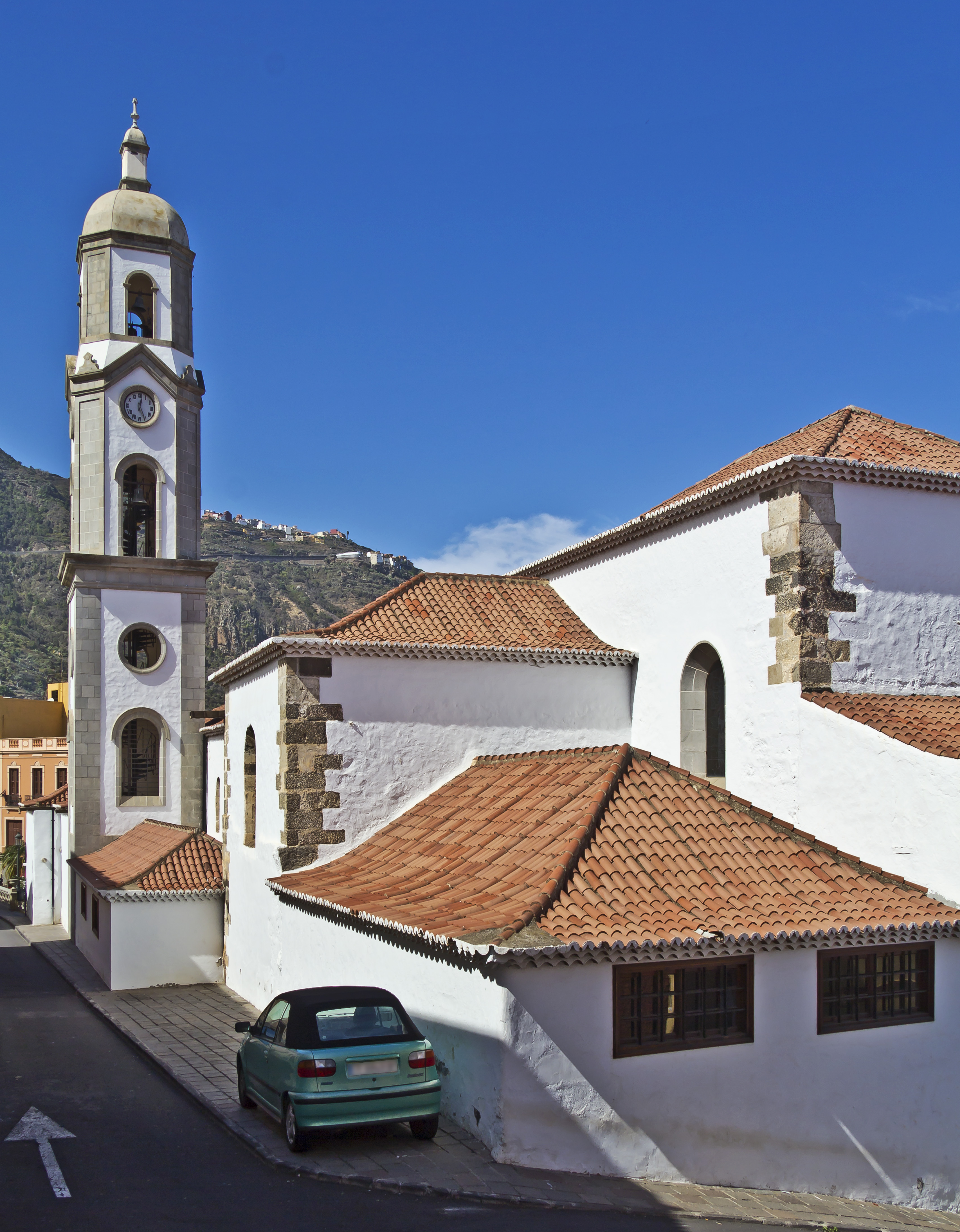 Kirche Nuestra Señora de la Concepción (Los Realejos)